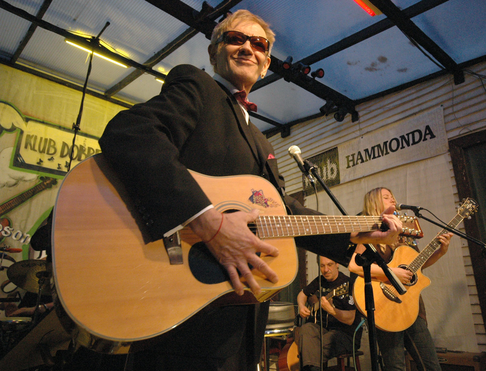 Maciej Zembaty performing in Warszawa, Poland in May 2009